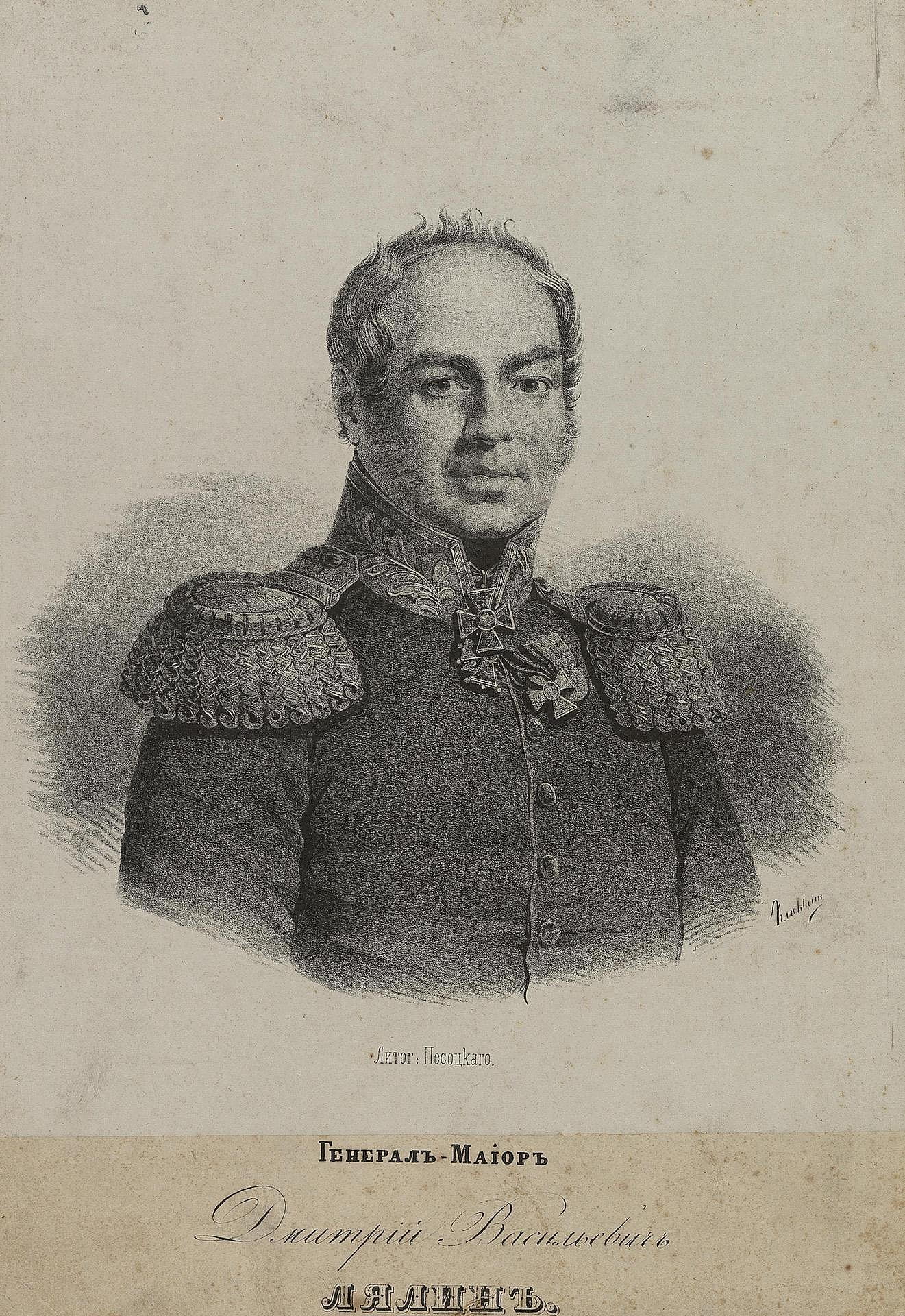 Портрет генерала Дмитрия Васильевича Лялина